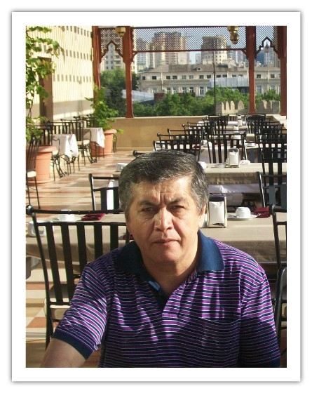 Хуршид Даврон - Народный поэт Узбекистана Oʻzbekcha/ўзбекча: Xurshid Davron - O'zbekiston xalq shoiri